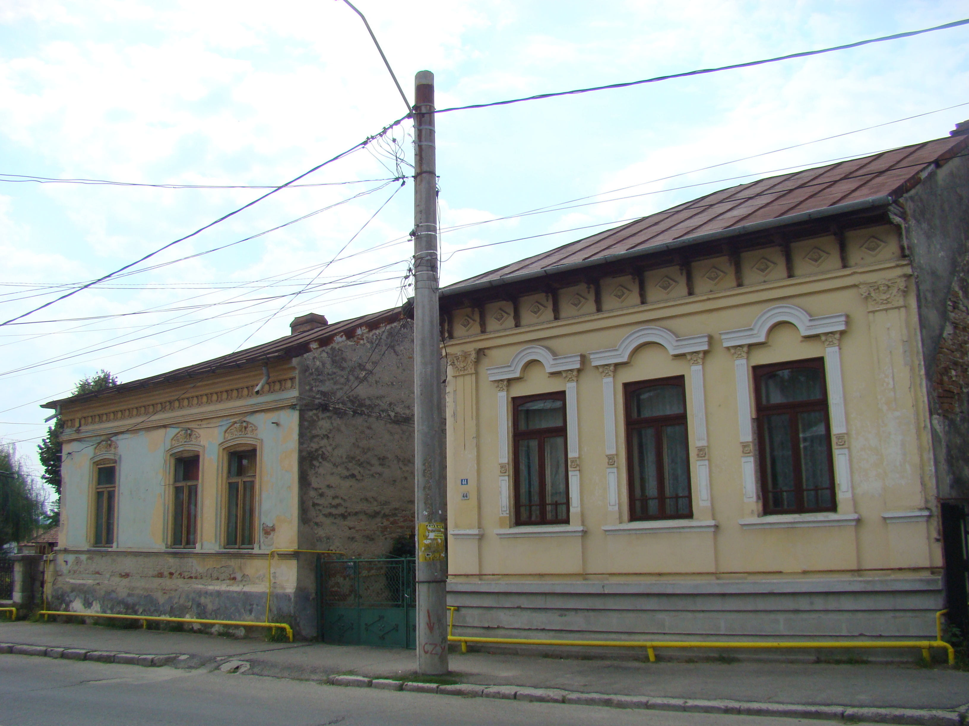 Situl urban "Orașul istoric Curtea de Argeș" (case de pe strada Negru Vodă)